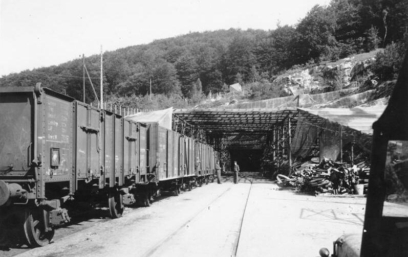 G8501 A 212